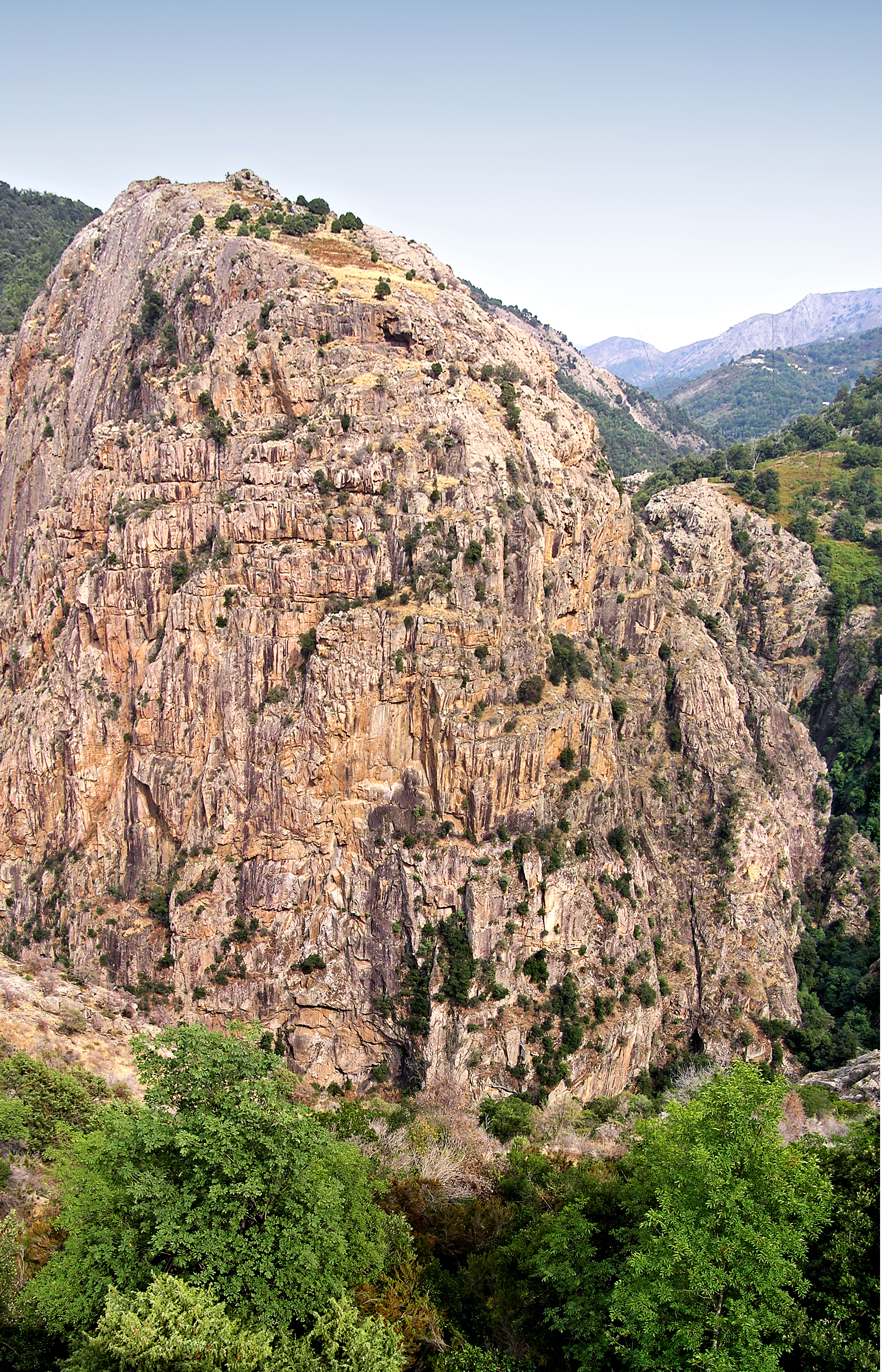 Evisa (Corsica) - Spilonca